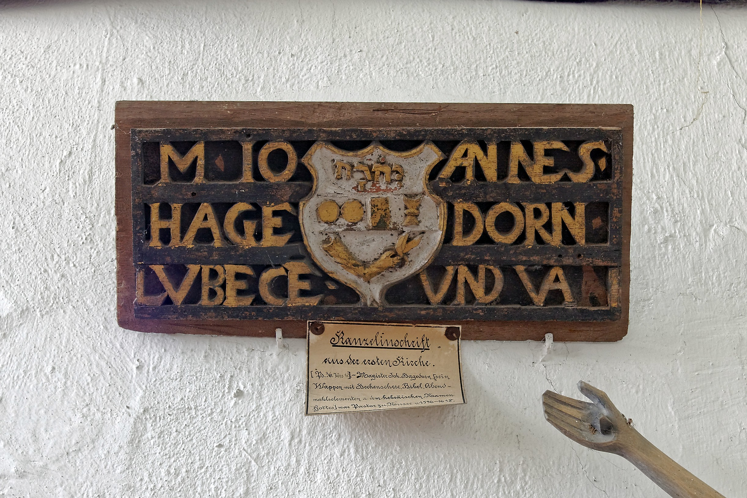 Kirche in Nusse, Reste der Kanzel der Vorgängerkirche